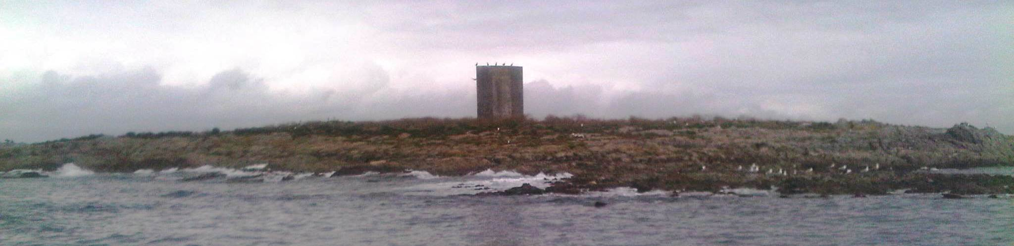 Photographie de l'Île Verte (Bretagne Sud, France), prise à une centaine de mètres.